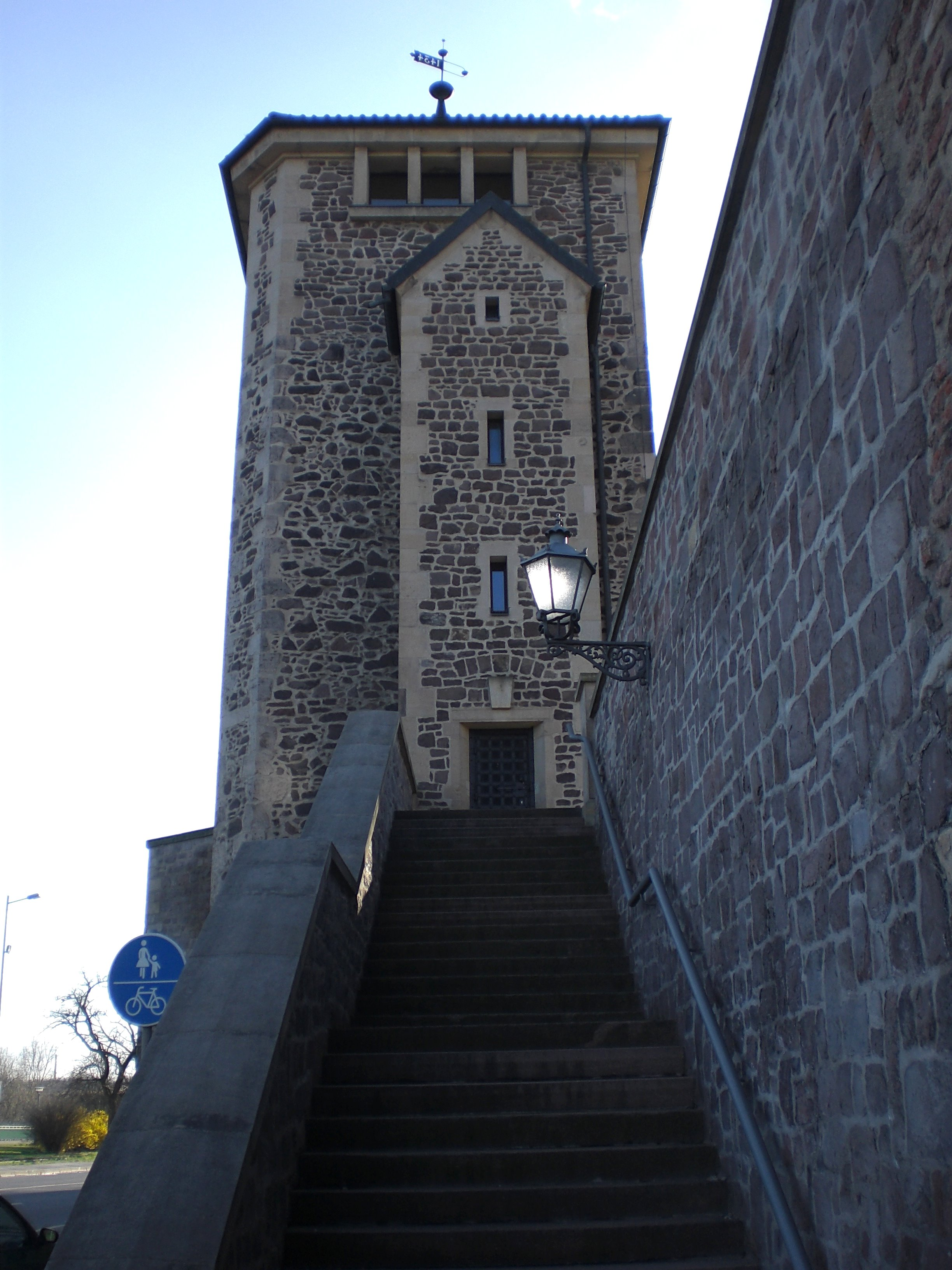 Kiek in de Köken, Wehrturm in Magdeburg, Treppe vom Schleinufer